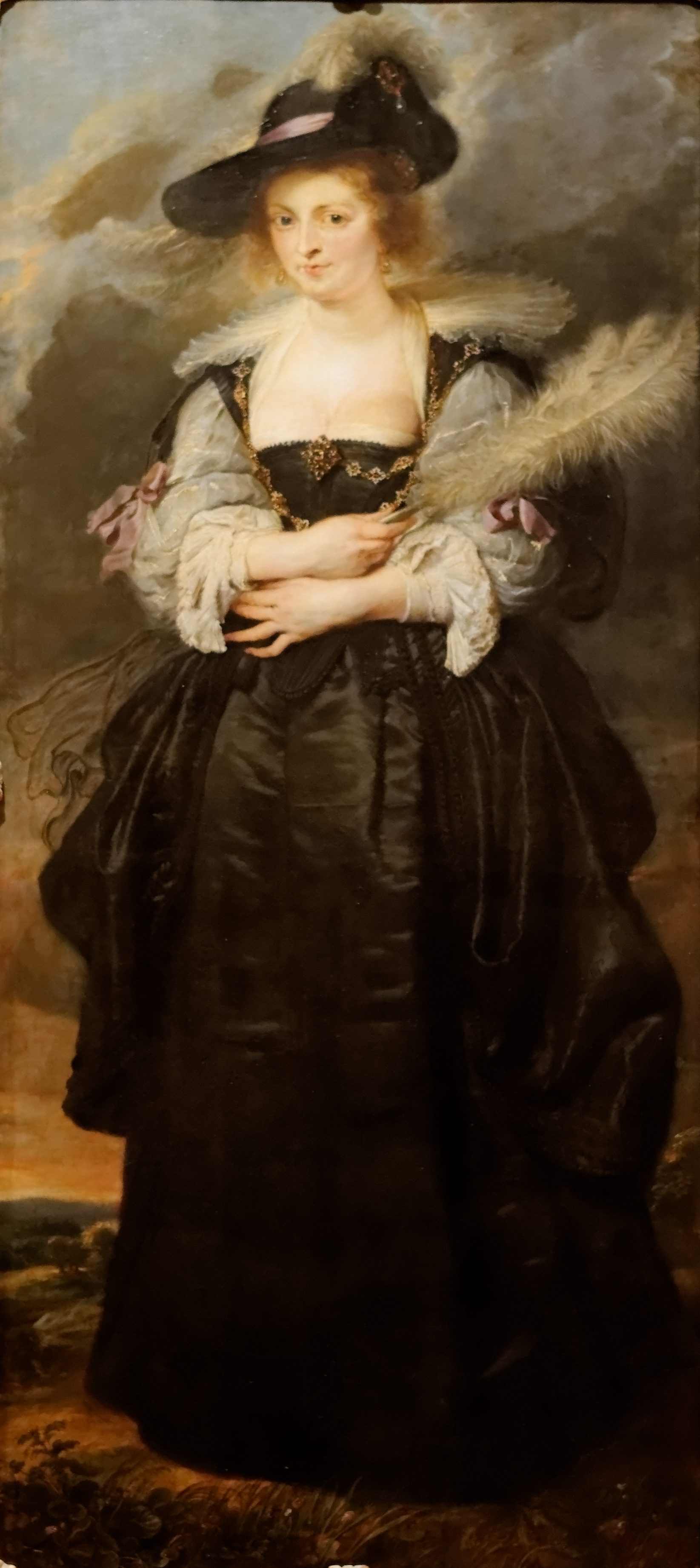 Portrait d'Hélène Fourment, Pierre Paul Rubens (1577-1640). Huile sur bois, ca 1630-32. Musée Calouste Gulbenkian, Lisbonne. Inv 959